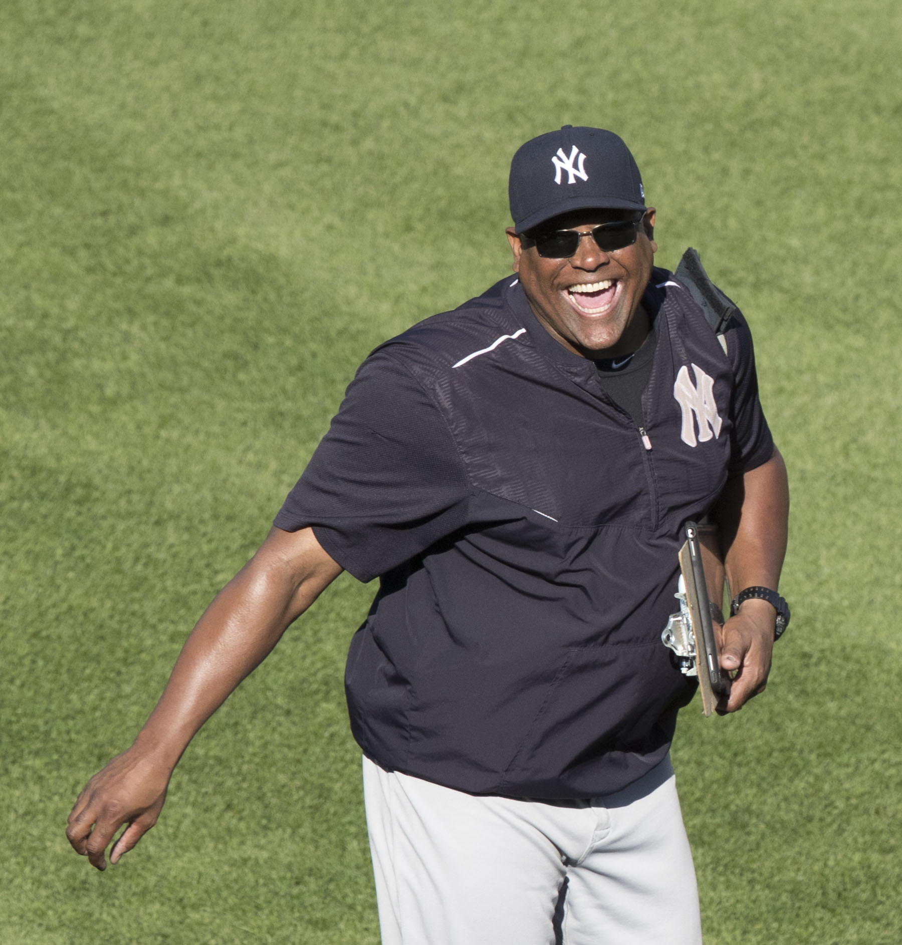 Yankees at Orioles 9/7/17